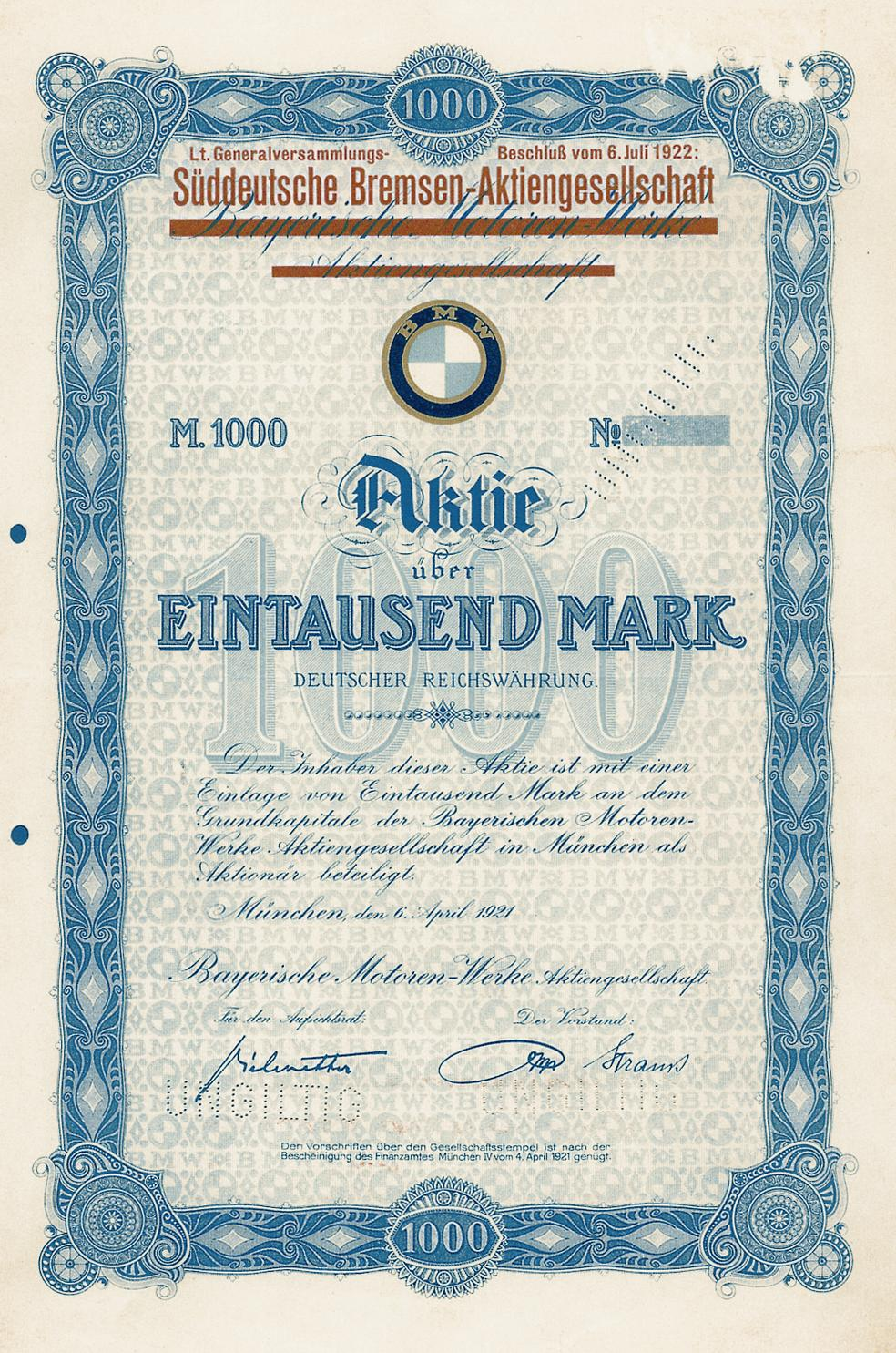 BMW SB Aktie.JPG